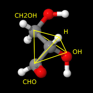 carboni assimetric o quiral